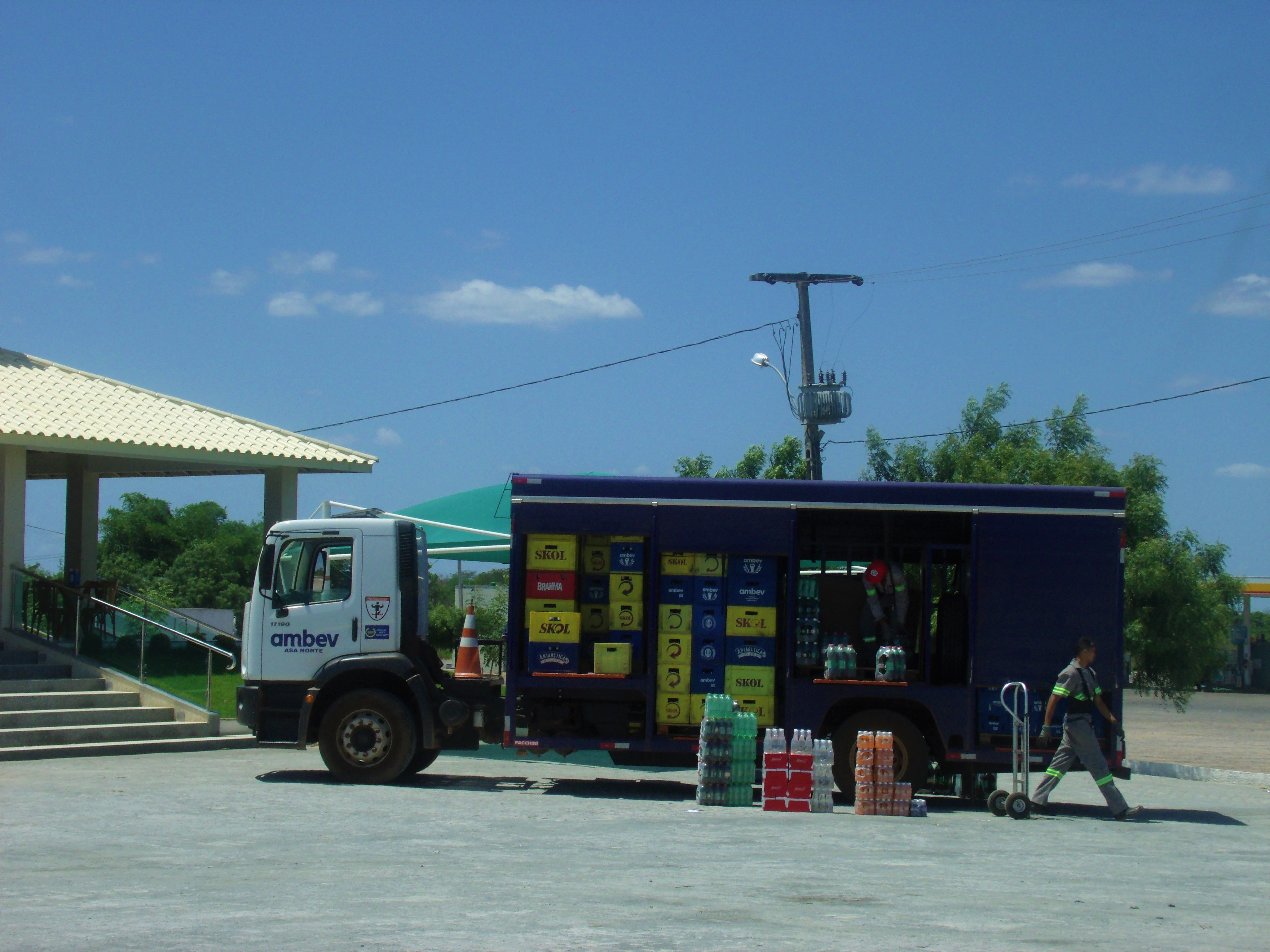 Veículo de carga da AmBev em Piripiri.